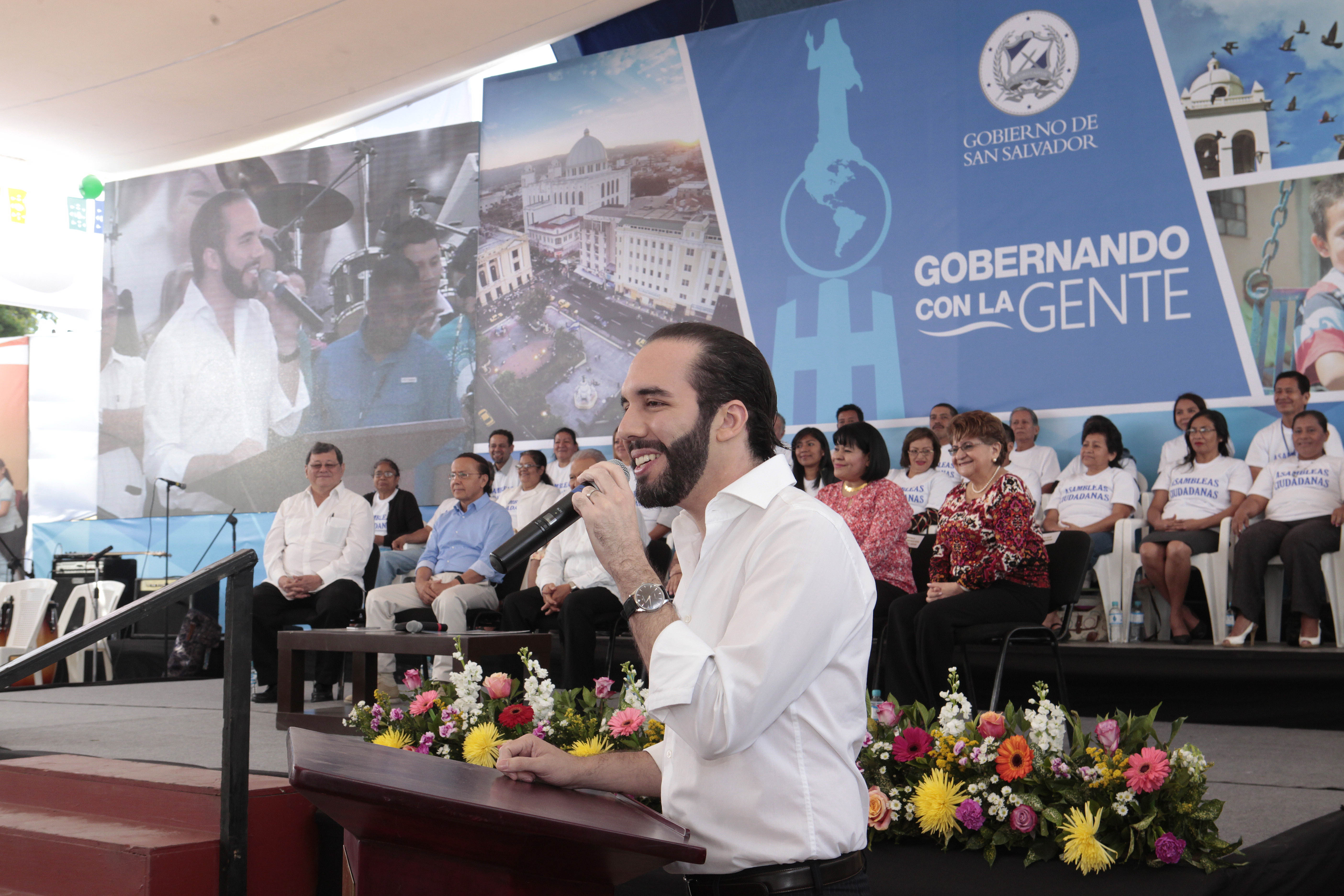 Alcalde de San Salvador , Nayib Bukele .